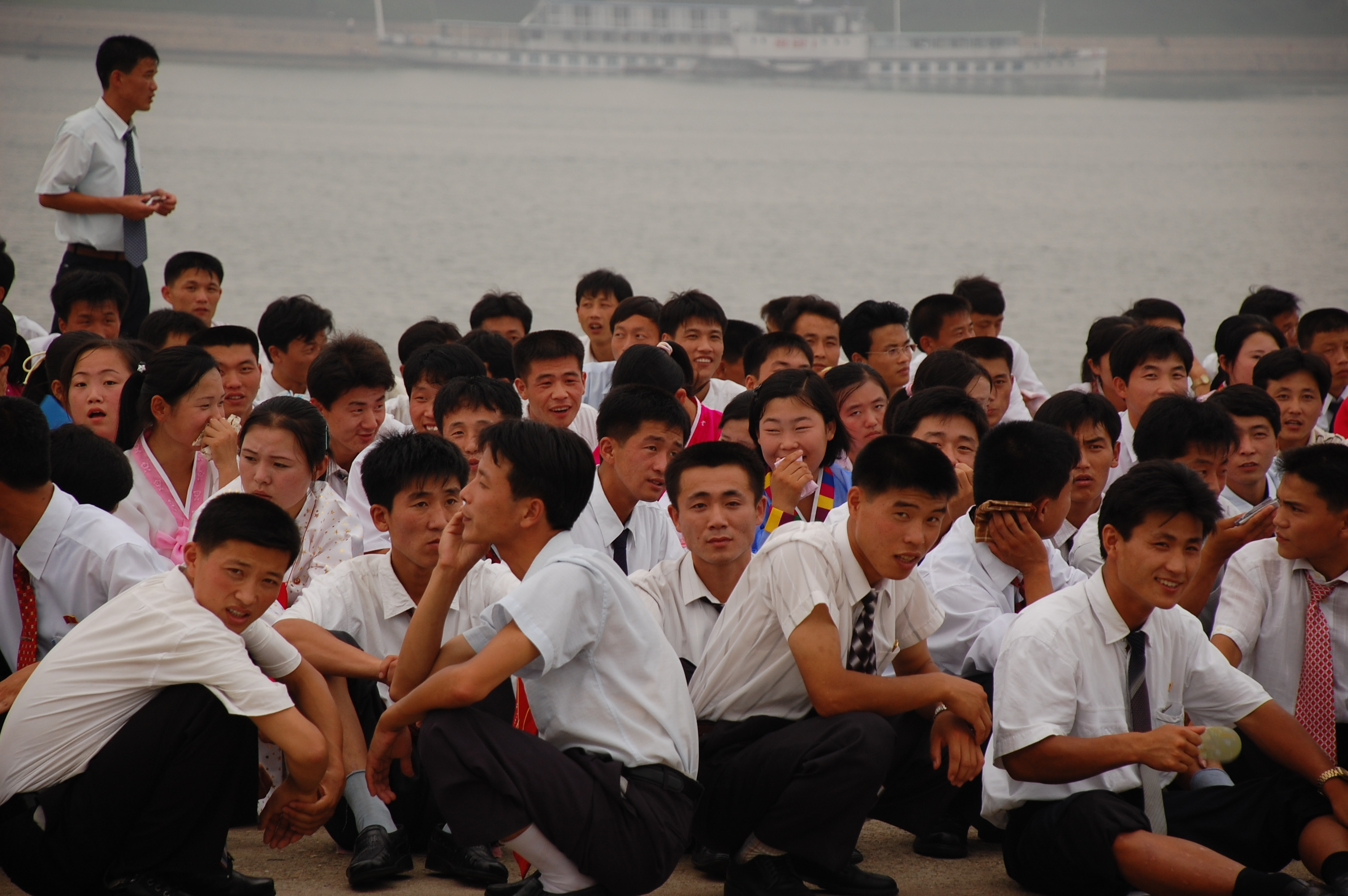 North Korea — Pyongyang